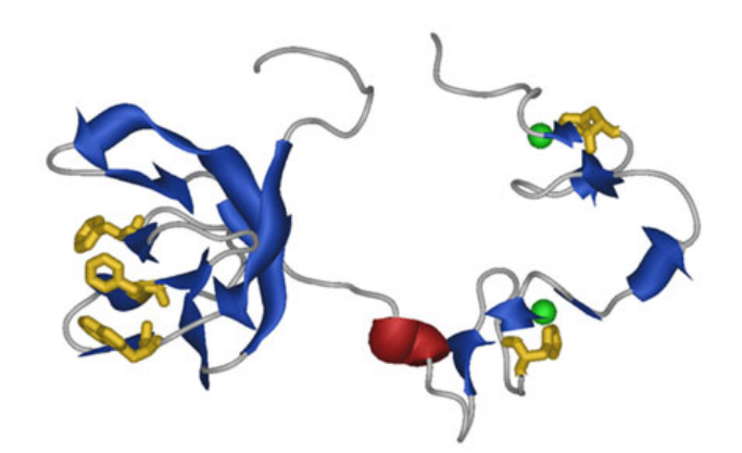 Azul: folhas beta; Vermelho: alpha hélice; Amarelo: resíduos aromáticos importantes para função da LIN28 ; Verde: átomos de zinco.